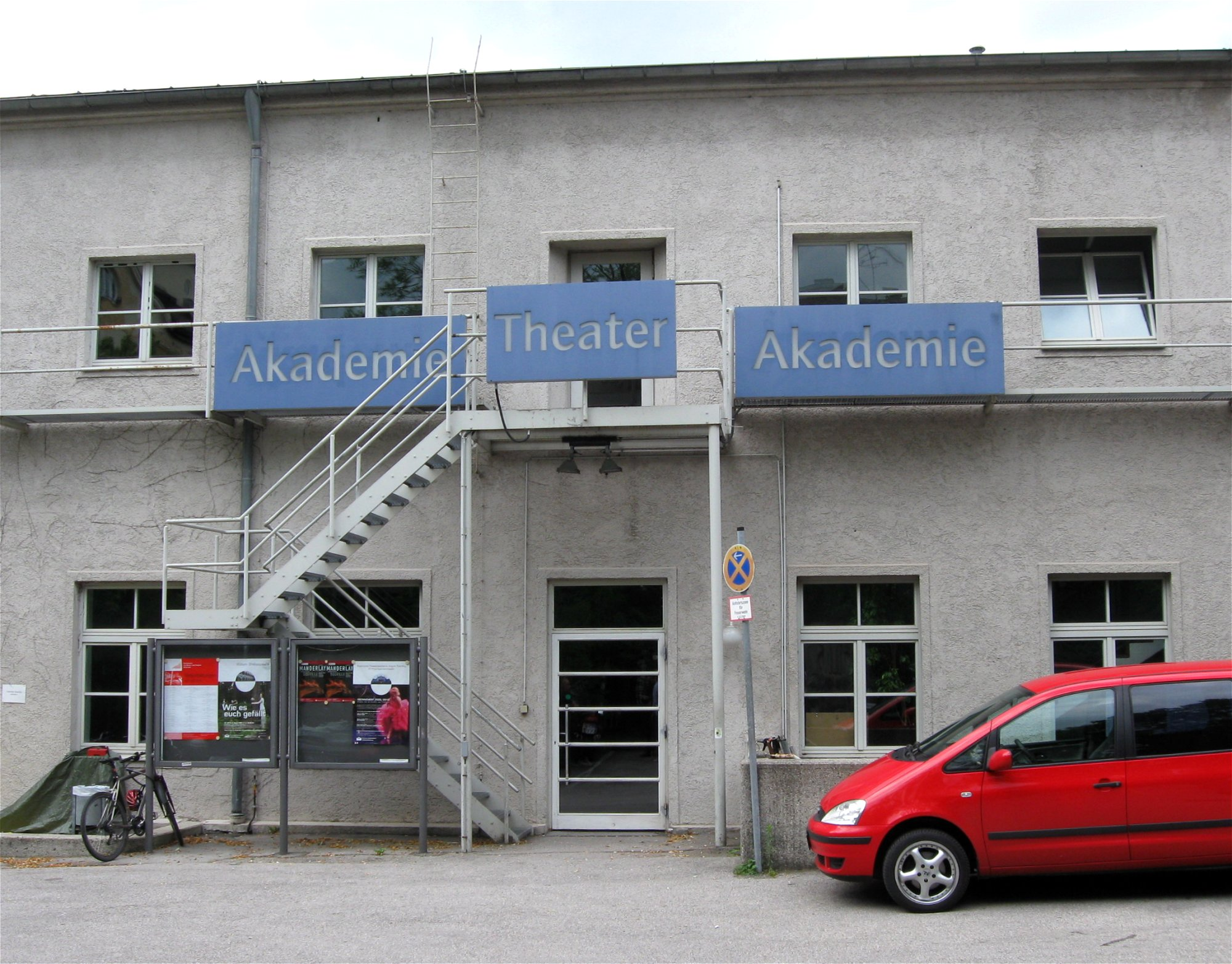 Akademietheater München